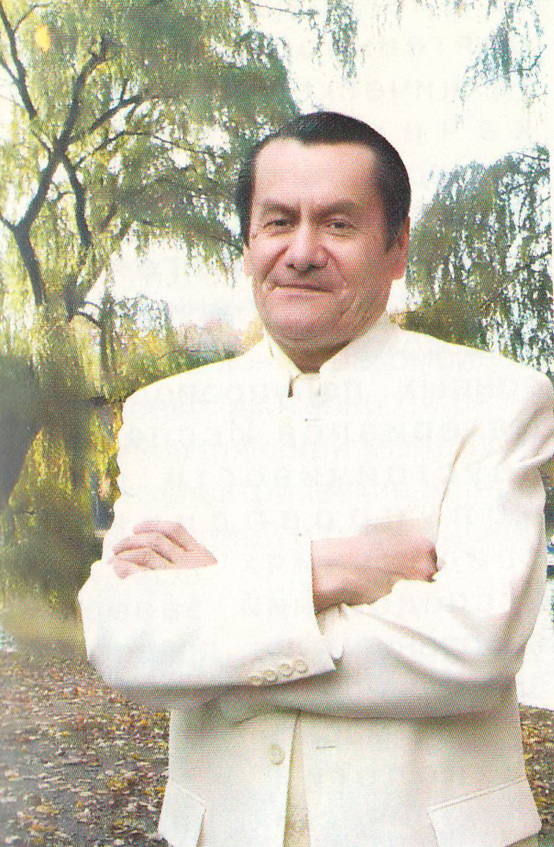 Каримов Абдулазиз